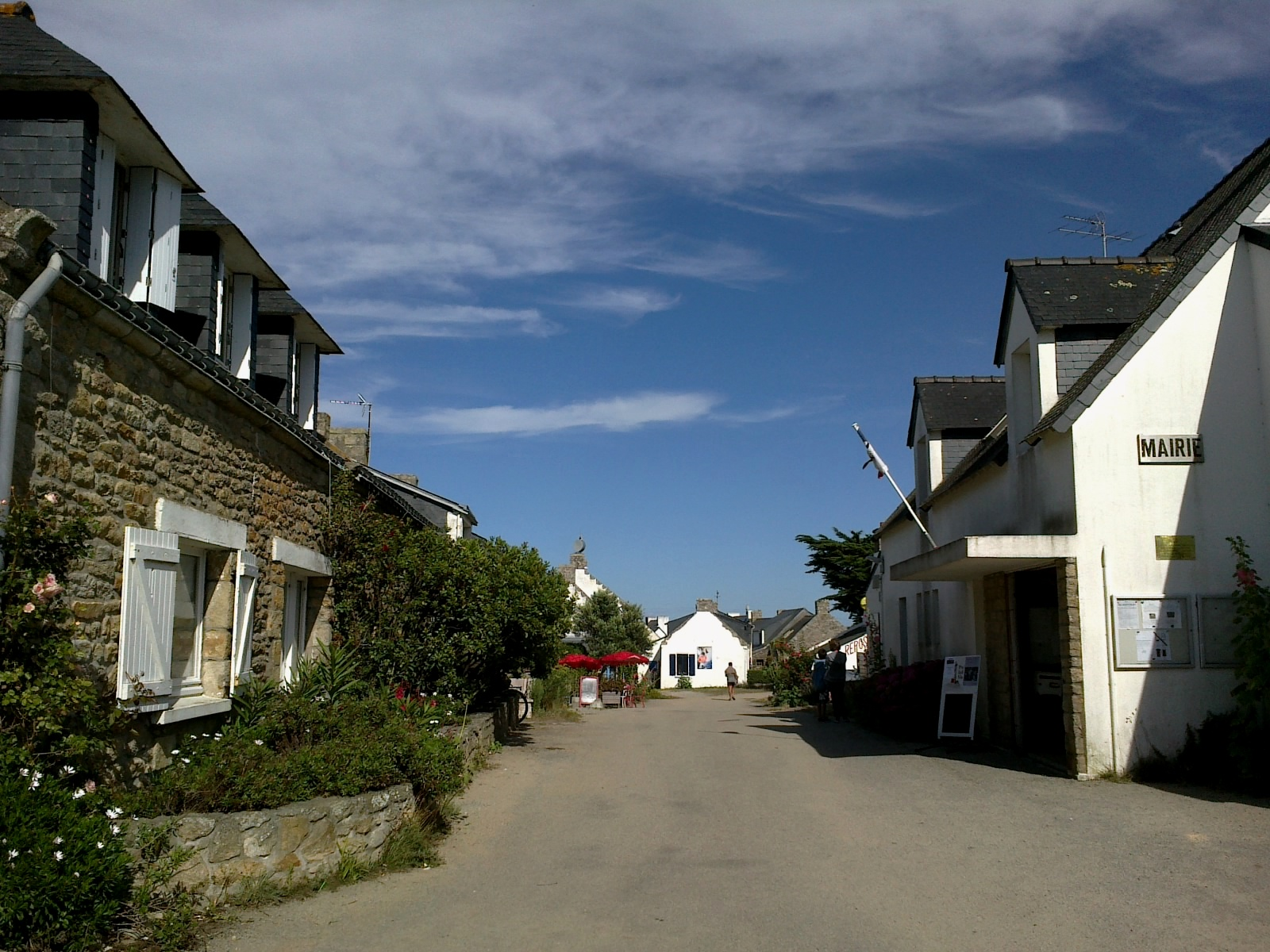 Hoedic Mairie